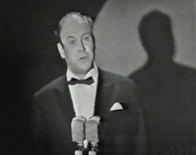 Eurovision Song Contest 1965 Regia di ROMOLO SIENA Allestimento scenografico di FRANCESCO DE MARTINO Luci di GUIDO CARACCIOLO Assistente alla regia ELENA AMICUCCI Assistente di studio MARCELLO SABETTI Capo stuadra tecnica ANGELO FONTANA Prima controllo camere GUSTAVO GALLARATO Capo tecnico audio CIRO PALLONETTO Cameramen ADOLFO BOTTA, SERGIO FREISSENET, ENRICO LANDINI, FLORIDO VARZI ________________________________ Ingvar Wixell